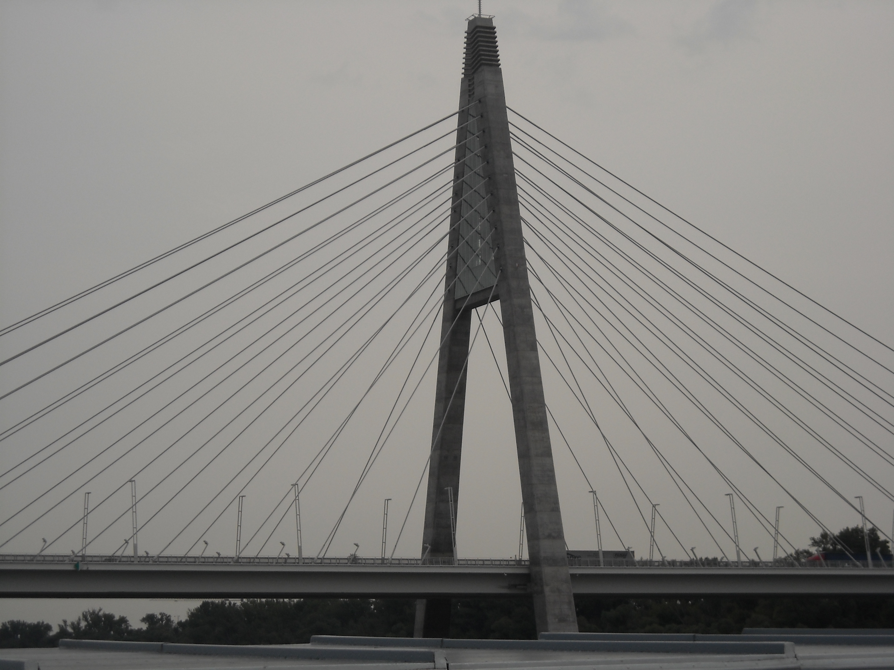 Träger Megyeri-Brücke 1